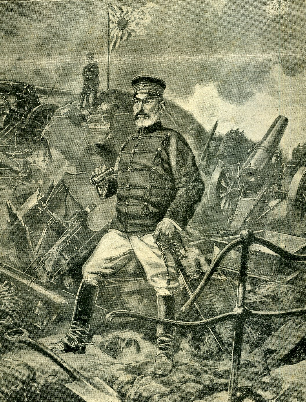 Devant Port-Arthur. Le général japonais Nogi Maresuke sur le théâtre de ses exploits.